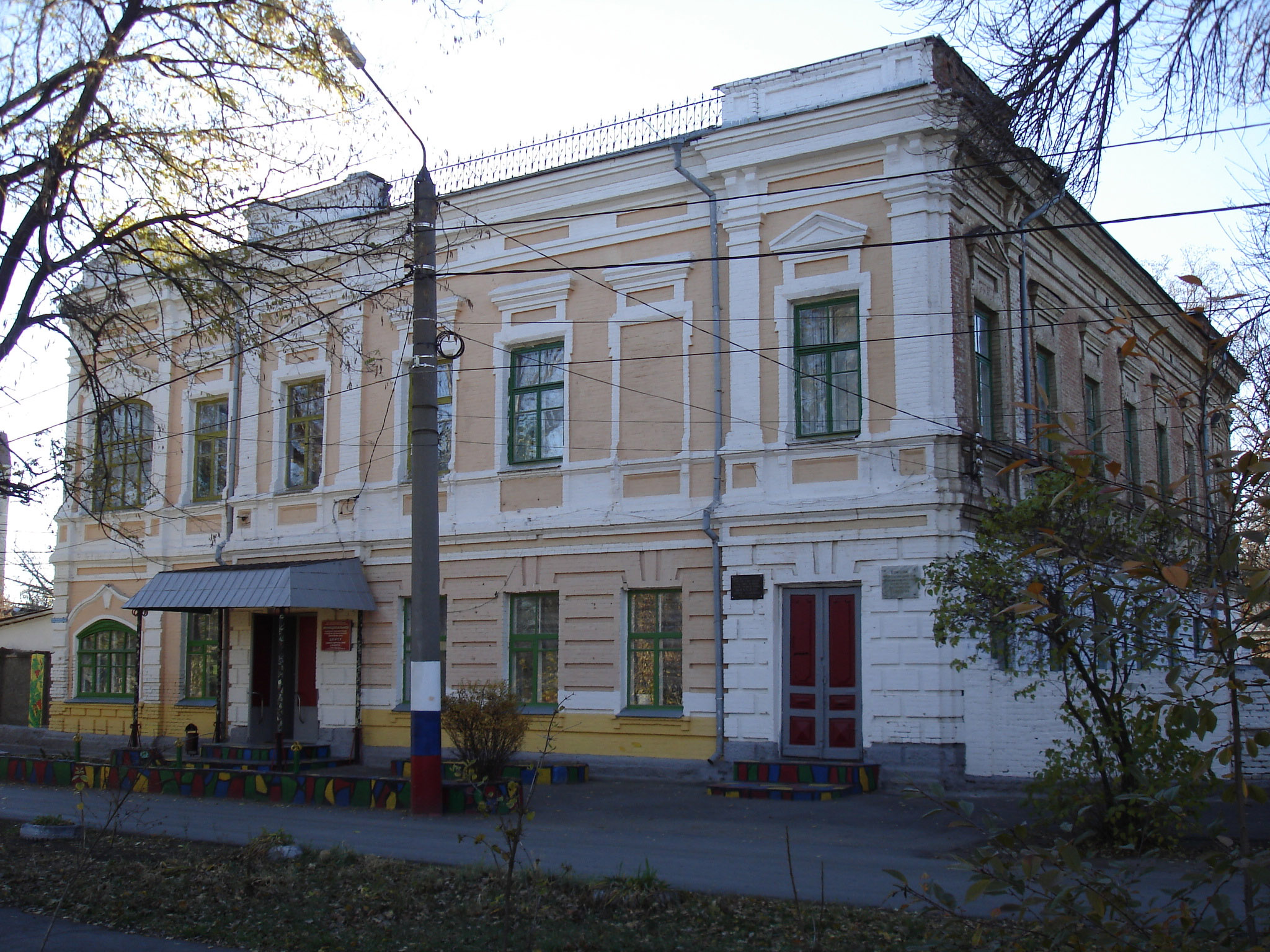 Каменск-Шахтинский, здание штаба Красной гвардии